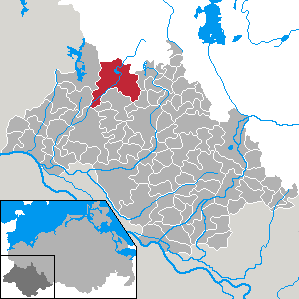 Wittendörp in Mecklenburg-Vorpommern - district Ludwigslust